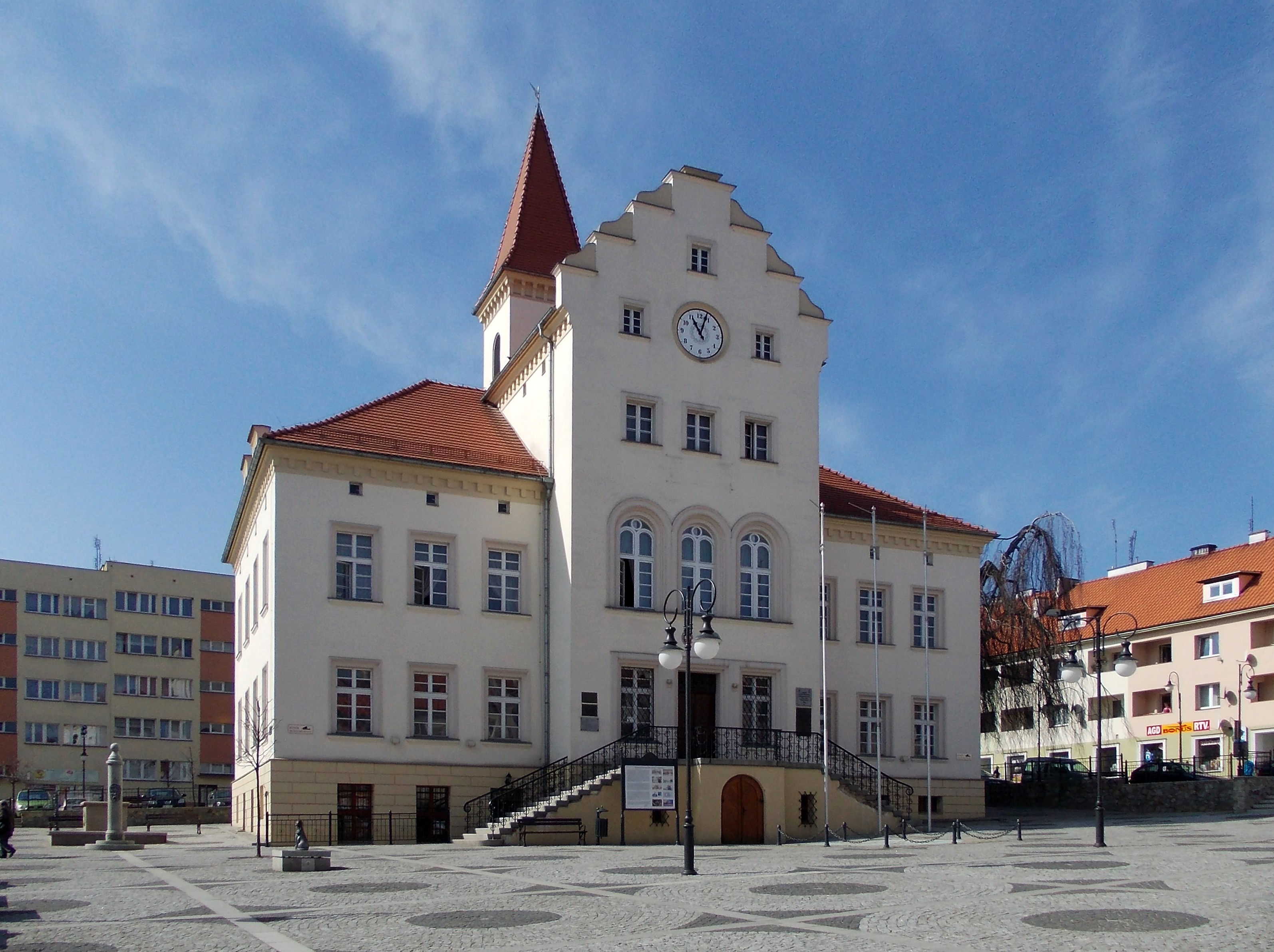 Trzebnica - radnice na náměstí (Polsko, Dolnoslezské vojvodství)